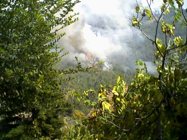 Tallacano incendio (02)